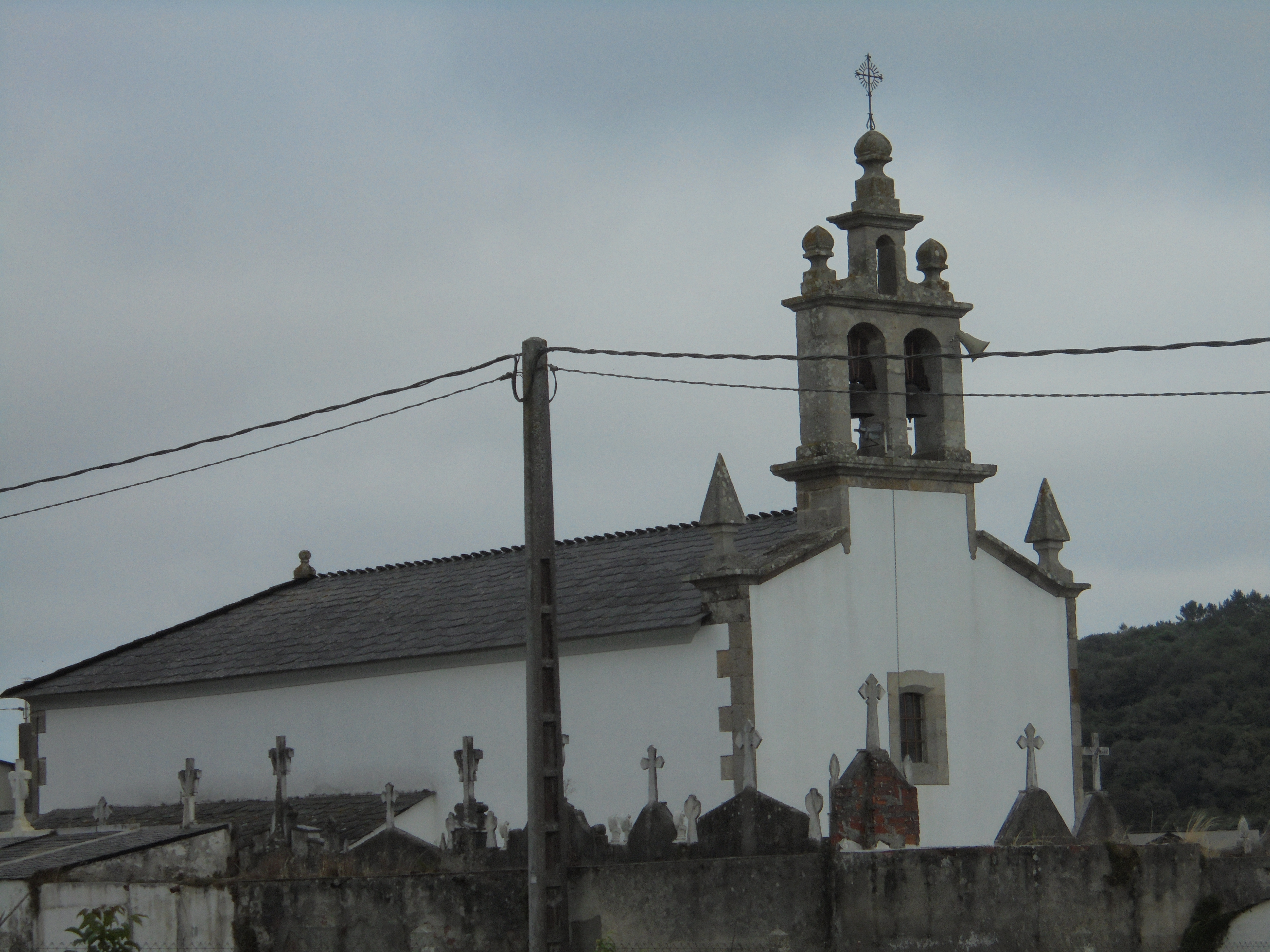 Igrexa parroquial de San Xoán de Tirimol ( Lugo)